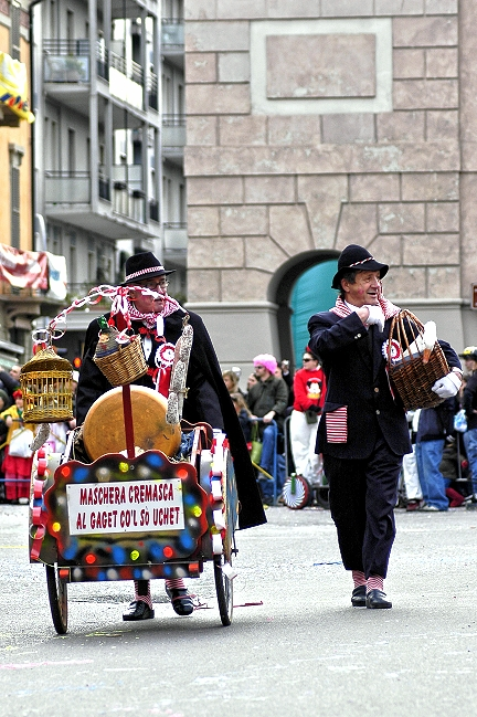 'l gagèt co 'l sò uchét, tipica maschera cremasca